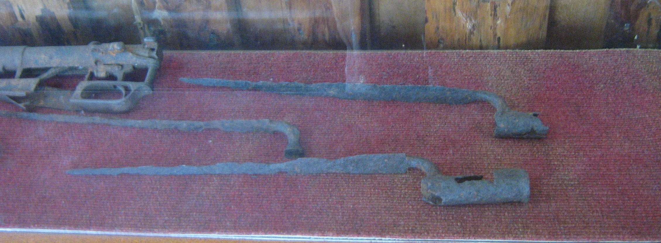 Bayoneta encontrada en el sitio del combate de Mocupulli (1 de abril de 1824) y expuesta en una vitrina del museo de Dalcahue, Chiloé, Chile.